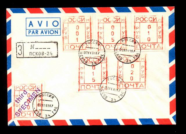 Конверт с пробным выпуском провизориев Пскова периода 1992-1994 годов.